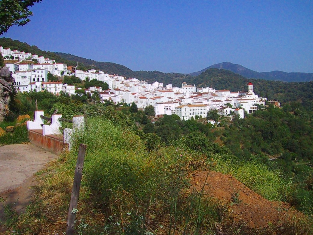 Genalguacil